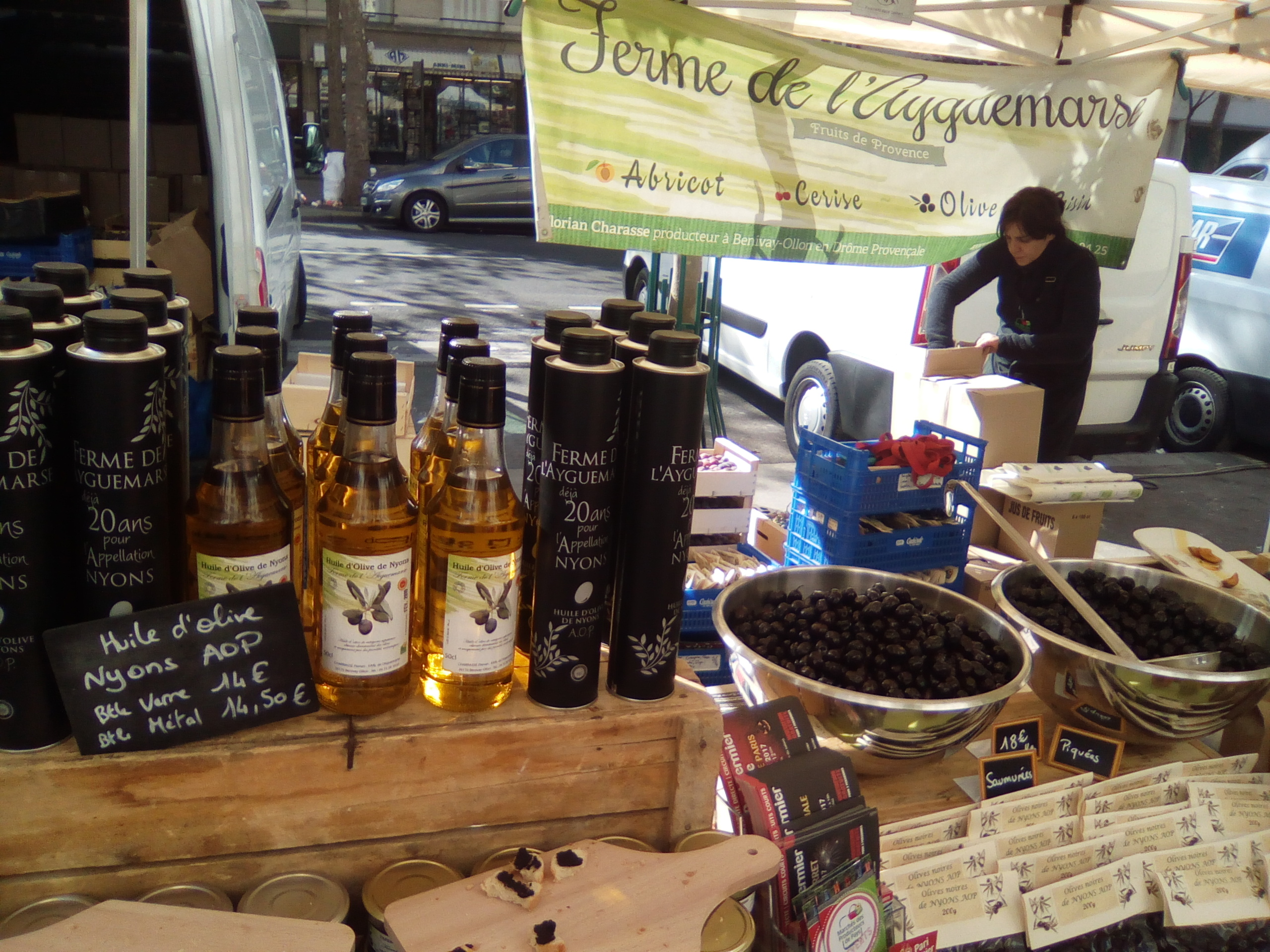 Stand au marché des producteurs de pays, boulevard de Reuilly à Paris.